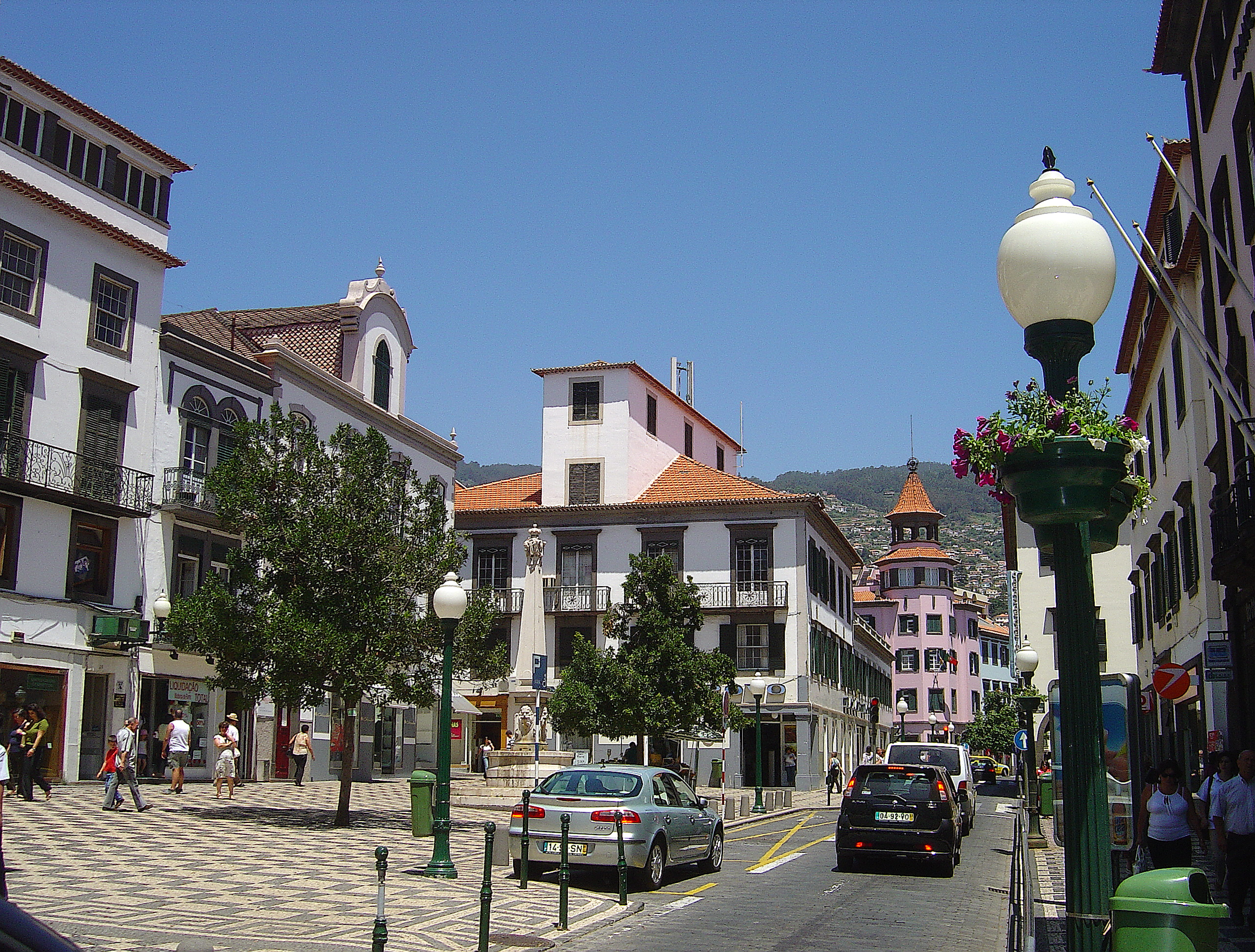 Foto: Flickr